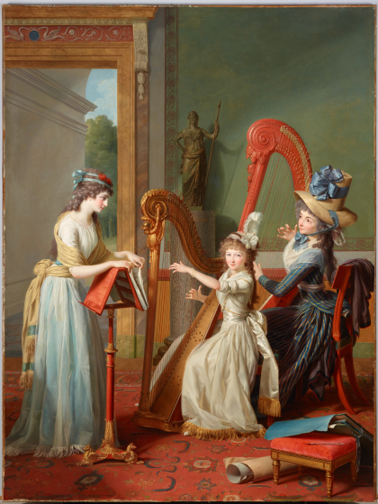 La Leçon de Harpe (1791) Dallas Museum of Art, huile sur toile 246 x 185 cm